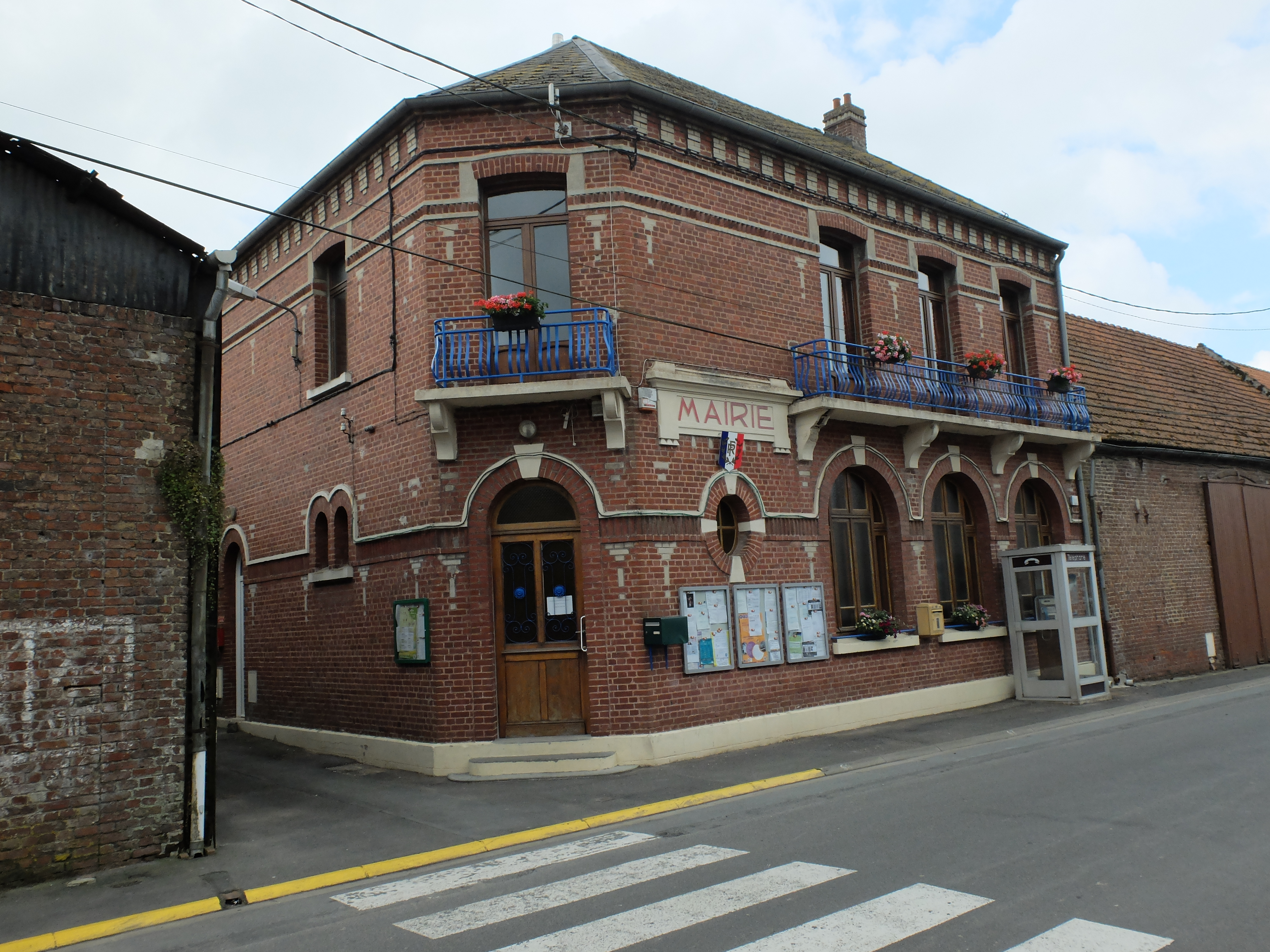 Vue de la mairie d'Étaing.